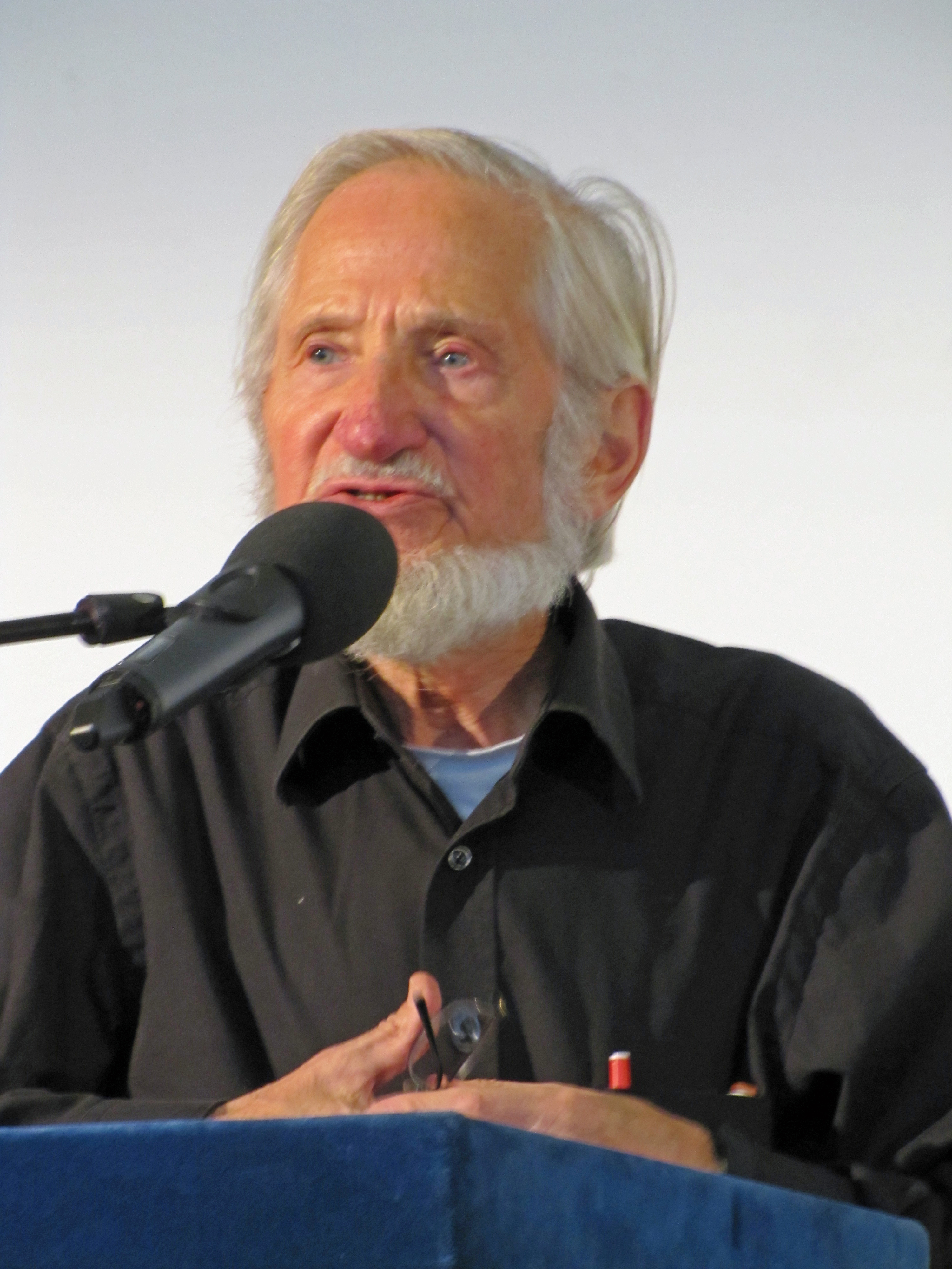 Rupert Neudeck, bei den Römerberggesprächen im Dezember 2014 in Frankfurt am Main.